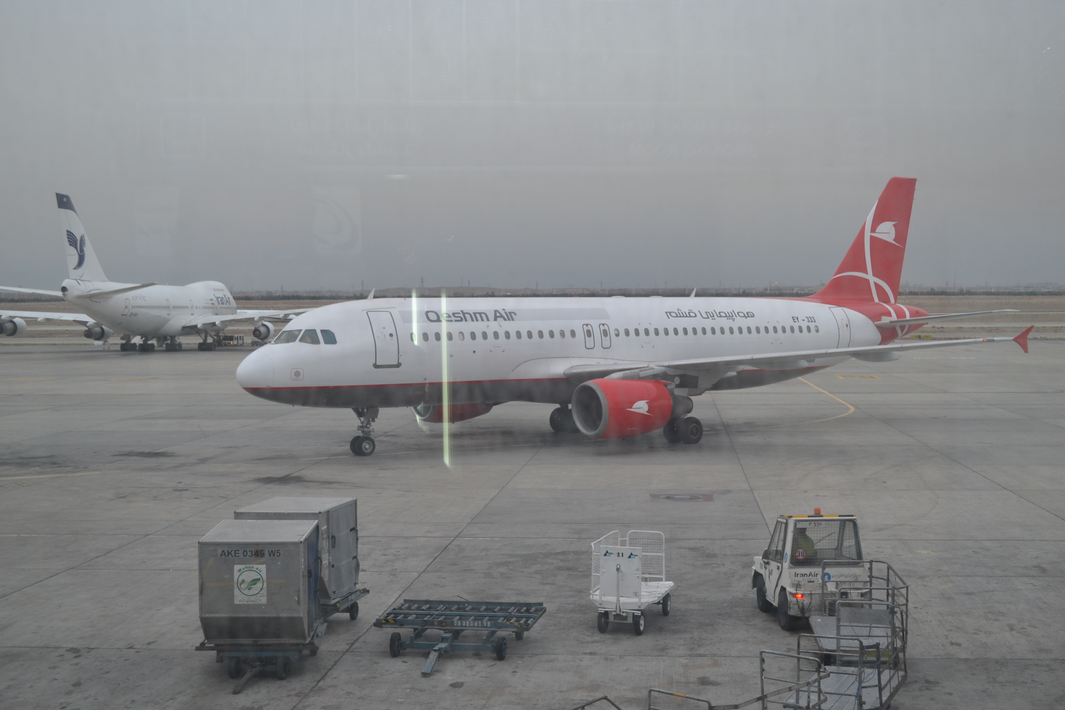 A320 de Qeshm Airlines en el Aeropuerto Internacional Imam Khomeini en Teherán, Irán